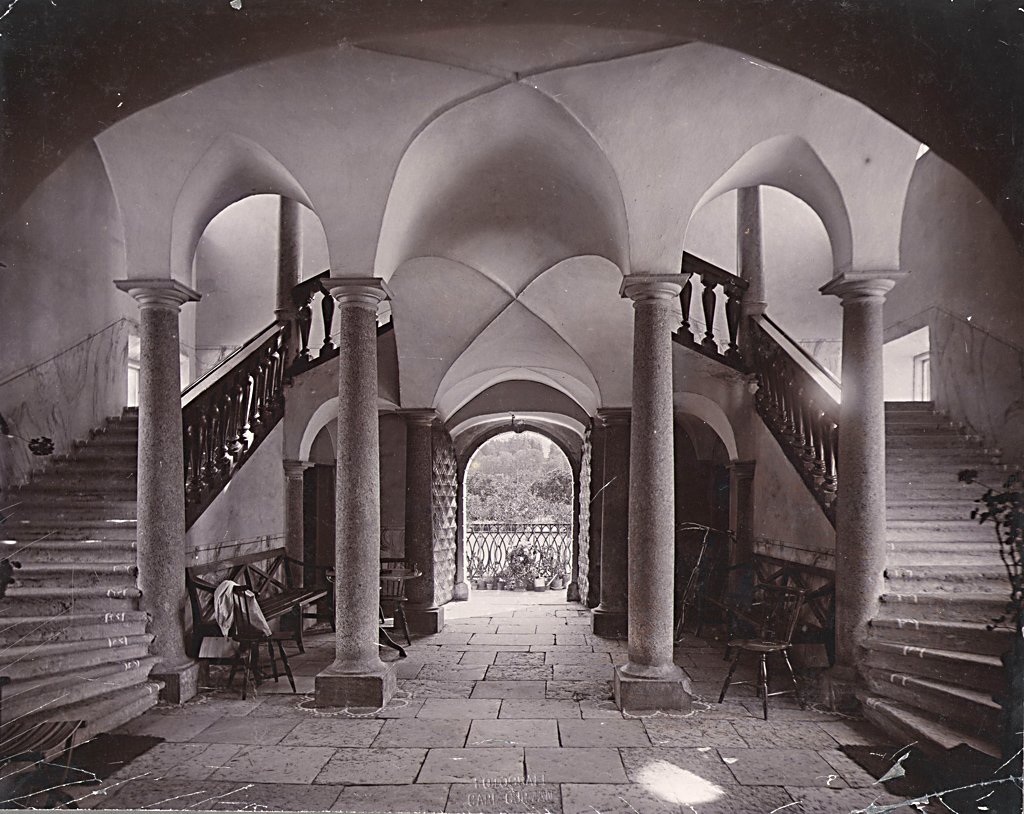 Trapphus i Årsta slott söder om Stockholm. Byggt omkring 1650, men med anor från 1300-talet.